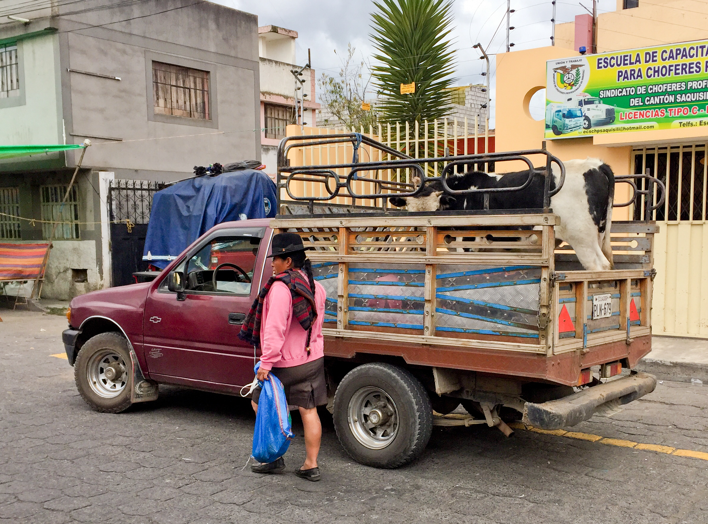 Transport einer Kuh. Indigener Markt in Saquisilí, Ecuador